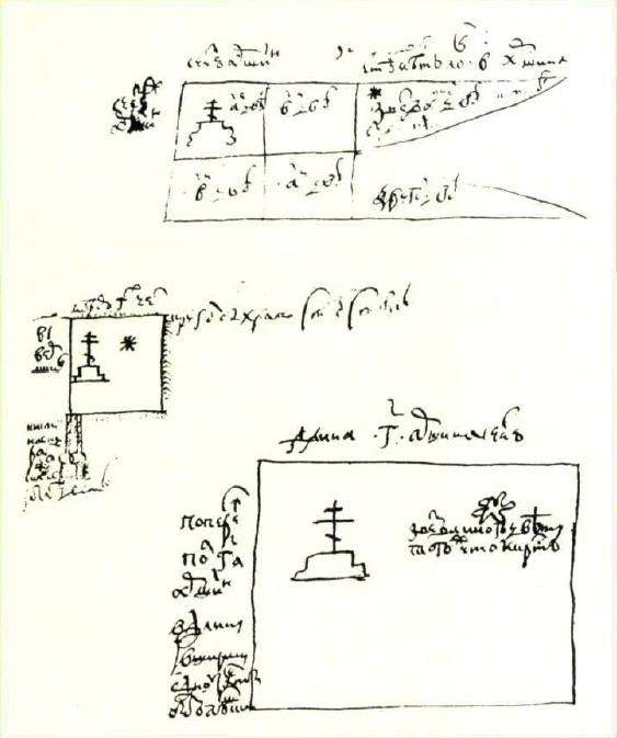 «Обрасцы», приложенные к «памяти» об изготовлении мастерами Казенного приказа драгунских, рейтарских и солдатских знамен для отправки в Белгород в полк воеводы Б. А. Репнина. 1665 г. (РГАДА. Ф. 396. Архив Оружейной палаты. № 9508. Л. 2, 3)